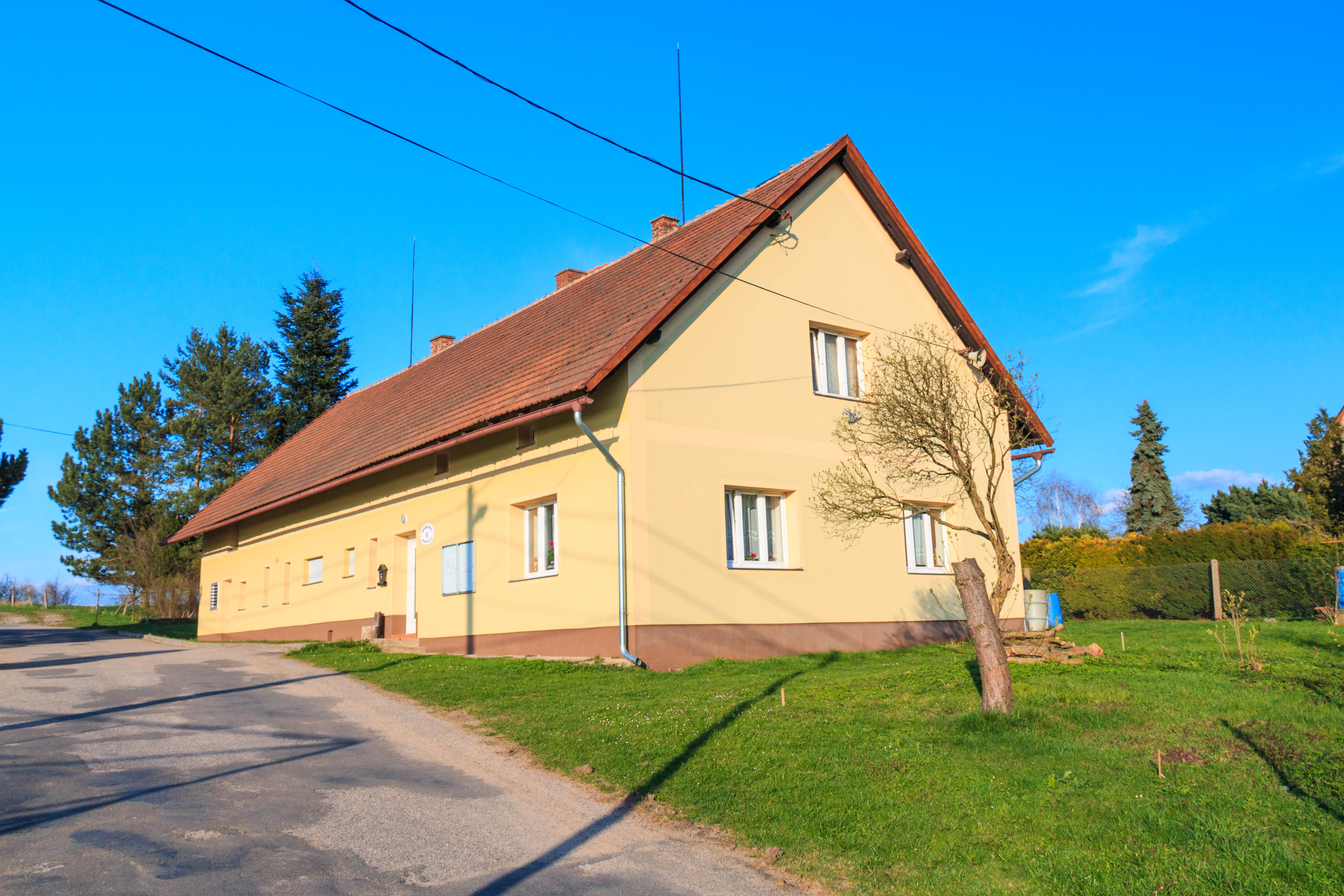 Přibyslav obecní úřad